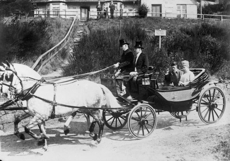 Das englische Königspaar erholt sich ! Der englische König und die Königin bei einem Ausflug in Schottland in Ihrer Equipage.